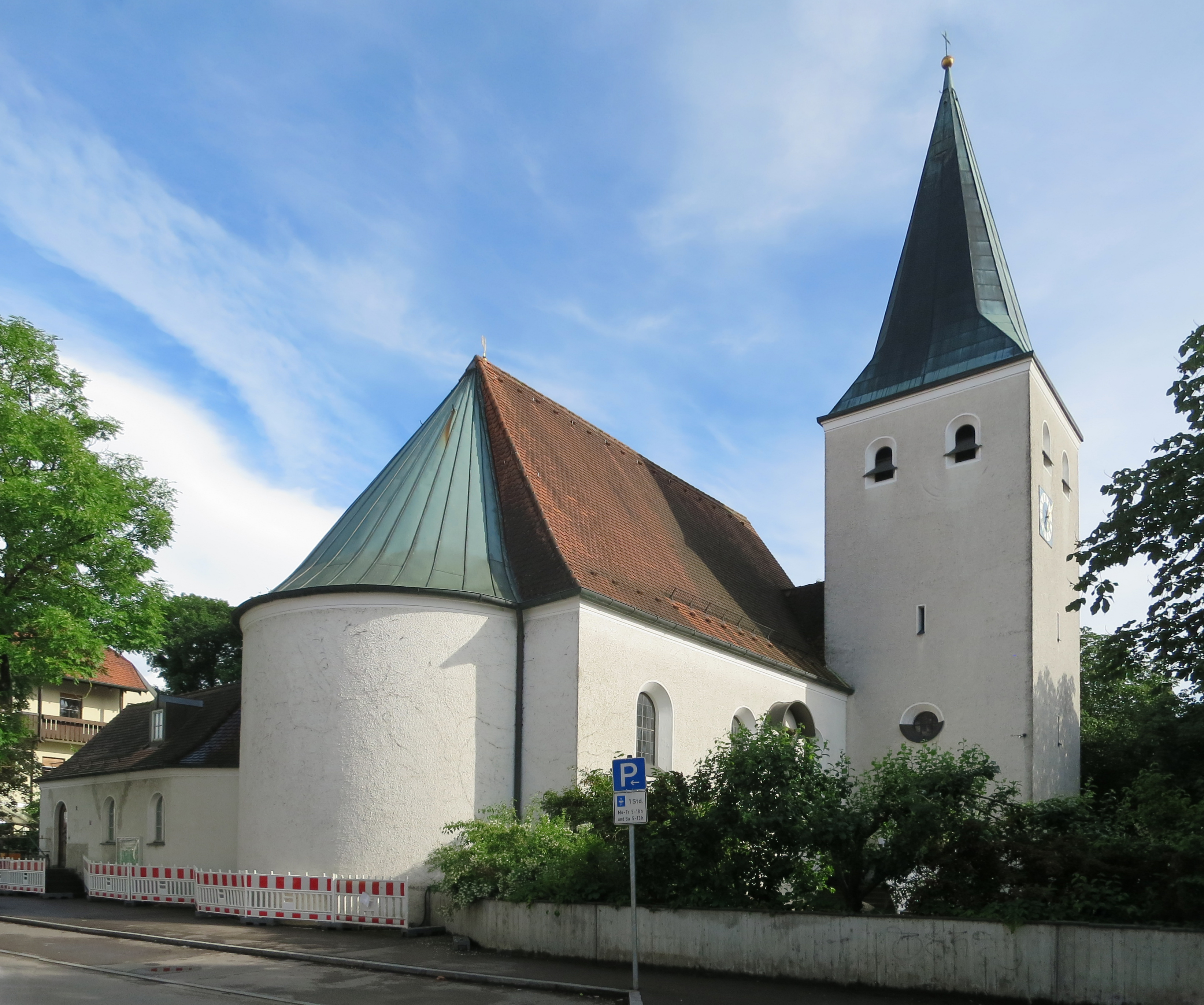 Das ist die evangelische Kreuzkirche, die gerade renoviert wird und behindertengerecht zugänglich gemacht wird.